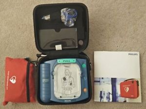 foto de el contenido de un botiquin